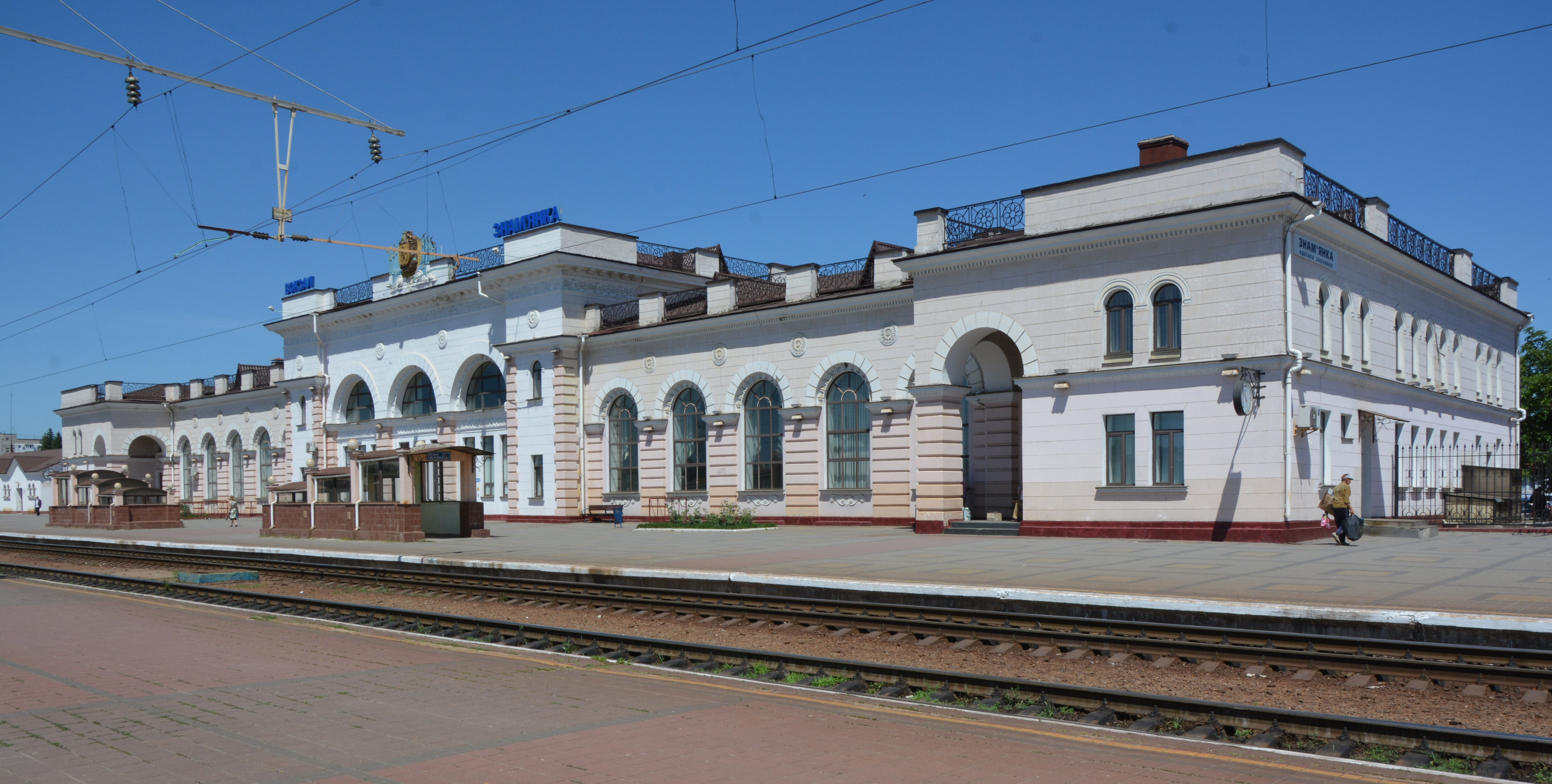 Залізничний вокзал, Знам'янка, вул. Привокзальна